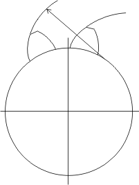 Involute gears